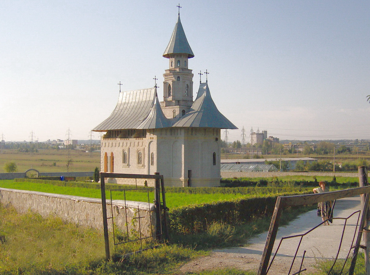 Mănăstirea Vlădiceni